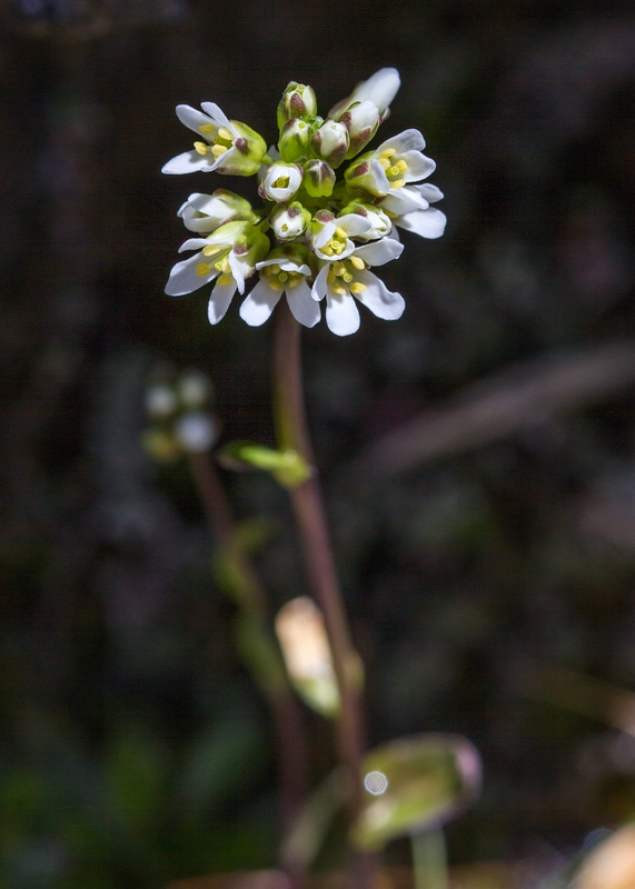 Glanz-Gänsekresse (Arabis soyeri subsp. subcoriacea) am_Gamsgrubenweg (ca. 2400 m ü.M.)